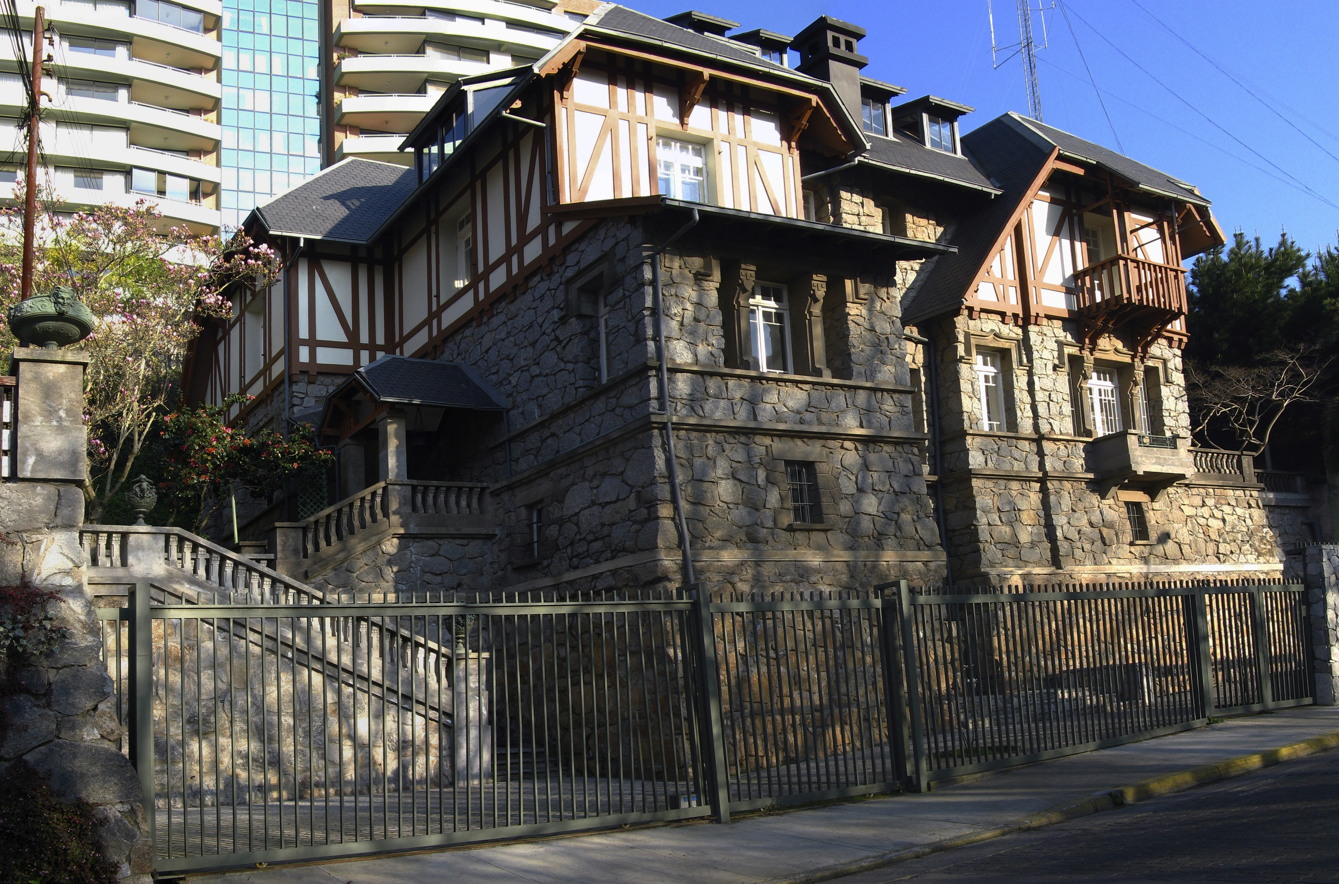 Casa Dr. Willhem Concepción, Chile, 2012. Construida a principios del siglo XX, a comienzos de 1917 perteneció al dentista Fryederup, sin estar acabada del todo. En 1918 la adquirió el médico Ottmar Wilhelm, acabándola en 1924. Se ubica al pie del Cerro Caracol, frente al Parque Ecuador. Arquitectura influenciada por las viviendas inglesas Tudor, combinando madera y piedra, y con franjas en la fachada hechas de madera. Actualmente es ocupada por la agencia de publicidad más grande del sur de Chile, Creatividad e Inteligencia.